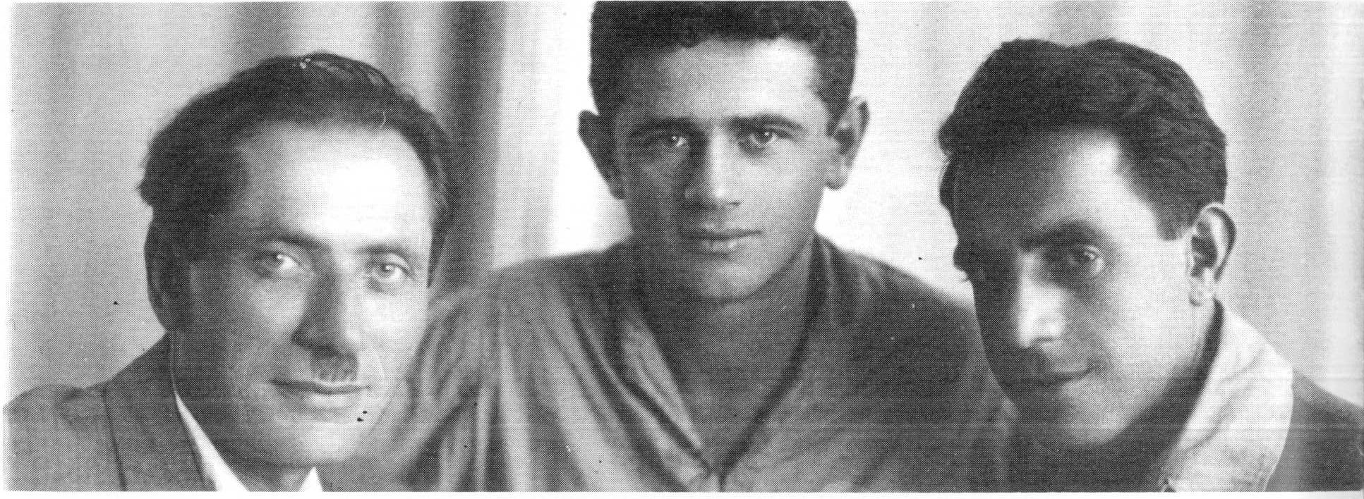 מימין לשמאל: משה בן אלול, המשורר זרבבל ודוד כהן